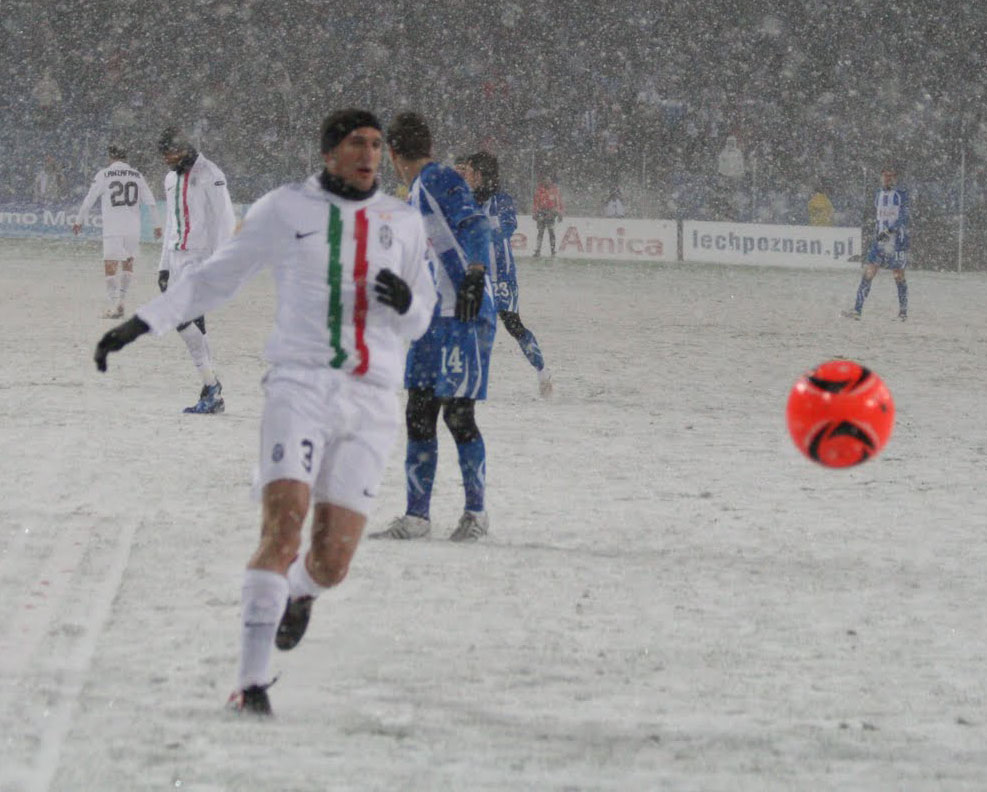 Il calciatore italiano Giorgio Chiellini in azione con la maglia della Juventus il 1º dicembre 2010, durante l'incontro di UEFA Europa League in casa del Lech Poznań.